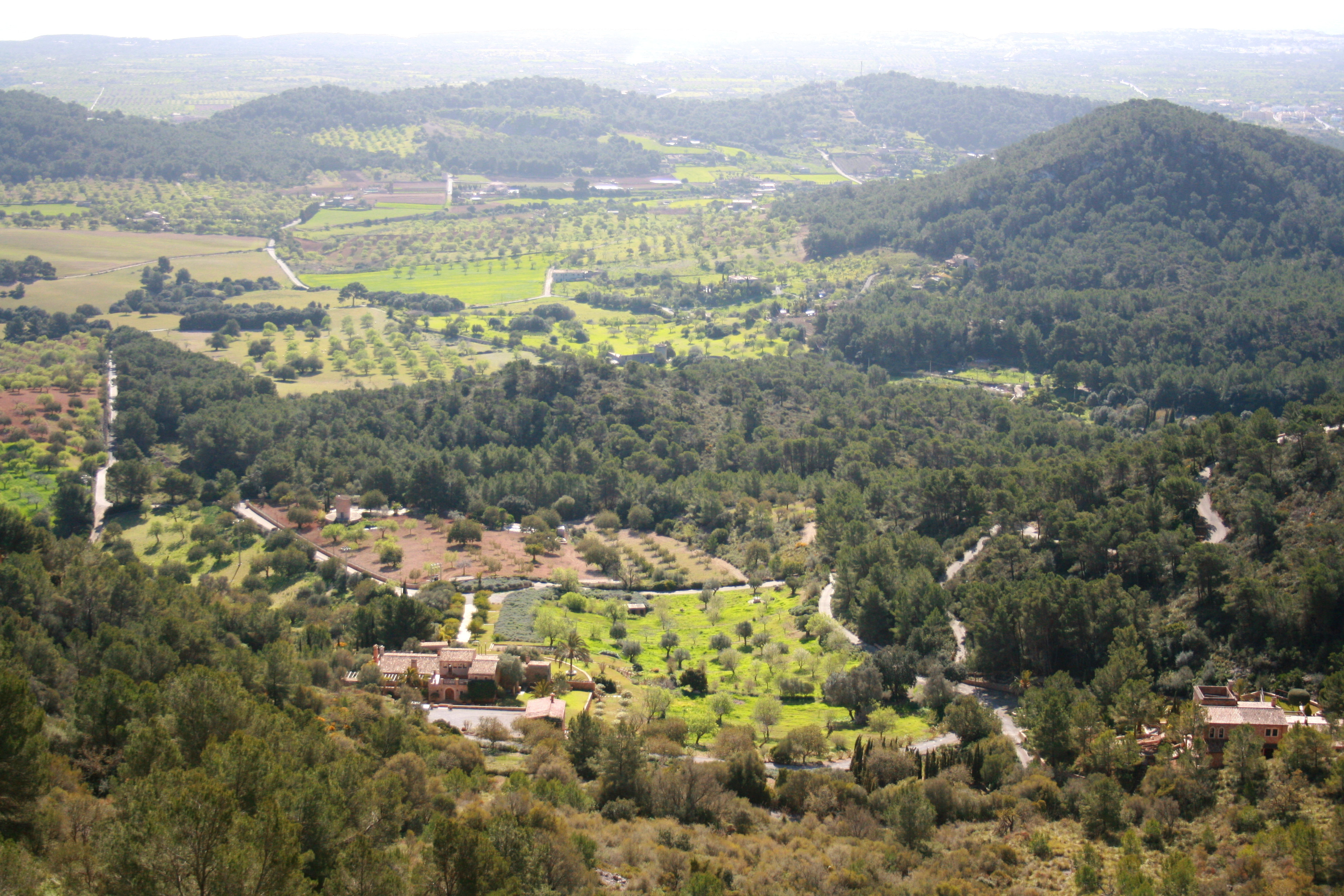 View from Castell de Santueri in Felanitx, Mallorca